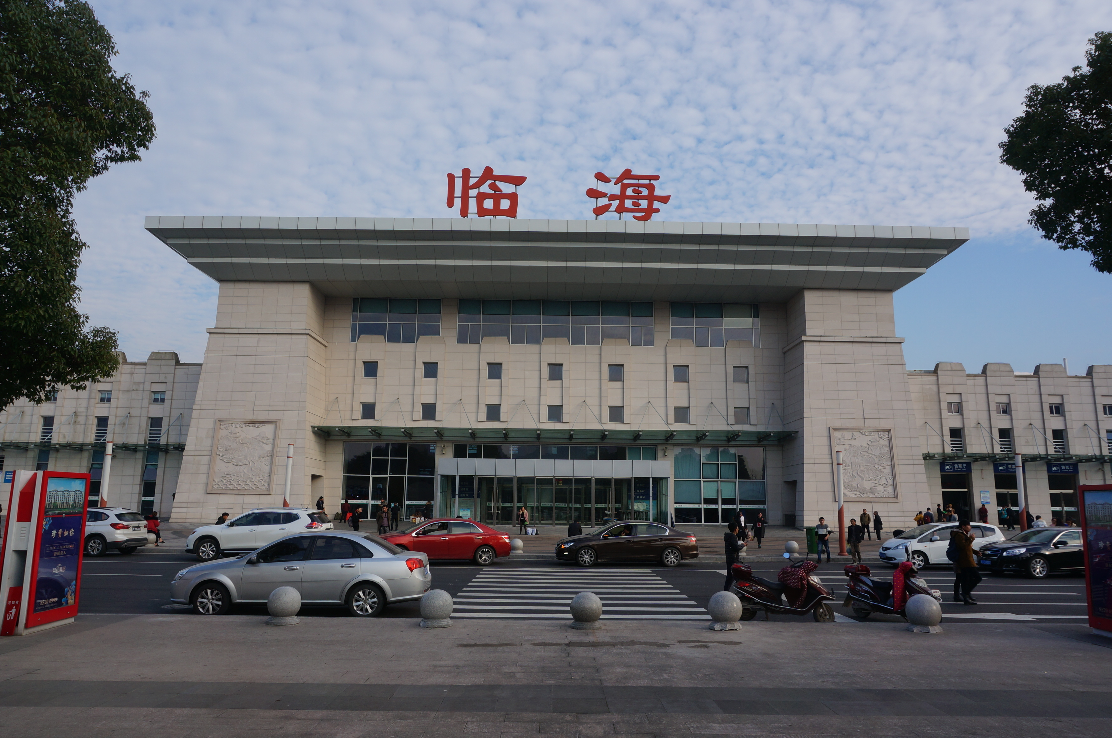 临海站，站房西面。